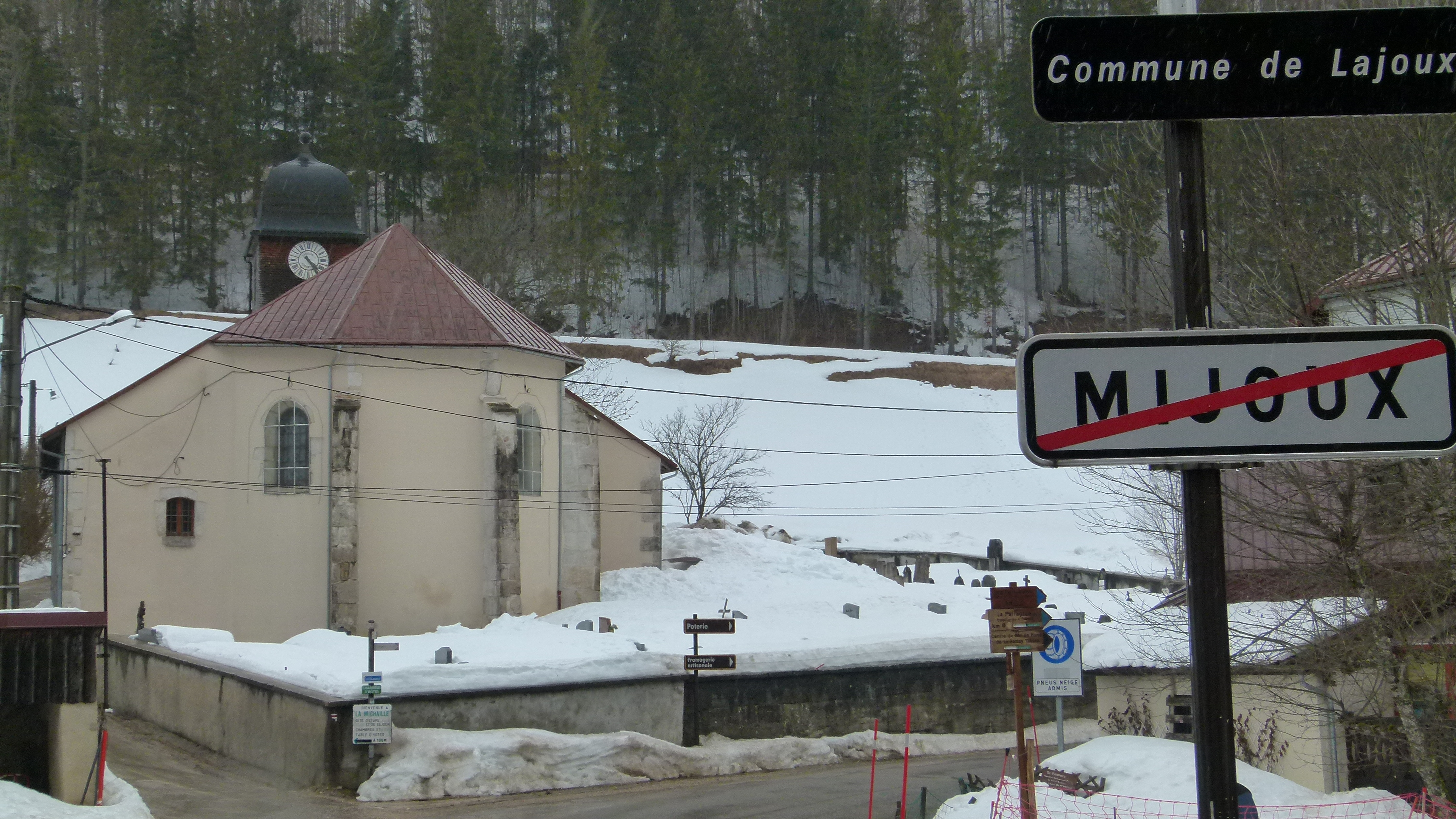 Dorfkirche von Mijoux, Jura